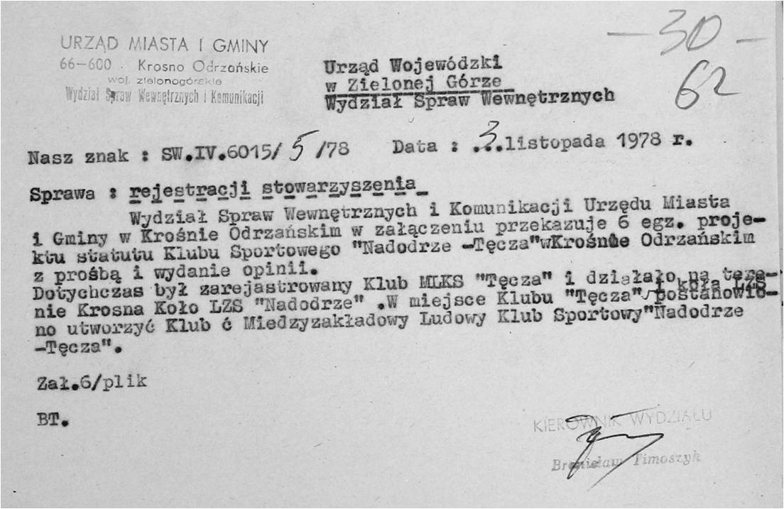 Informacja Wydziału Spraw Wewnętrznych i Komunikacji Urzędu Miasta i Gminy w Krośnie Odrzańskim do Wydziału Spraw Wewnętrznych Urzędu Wojewódzkiego w Zielonej Górze z 3 listopada 1978 r. w sprawie połączenia klubów sportowych "Tęcza" i "Nadodrze" i utworzenia MLKS "Nadodrze-Tęcza".